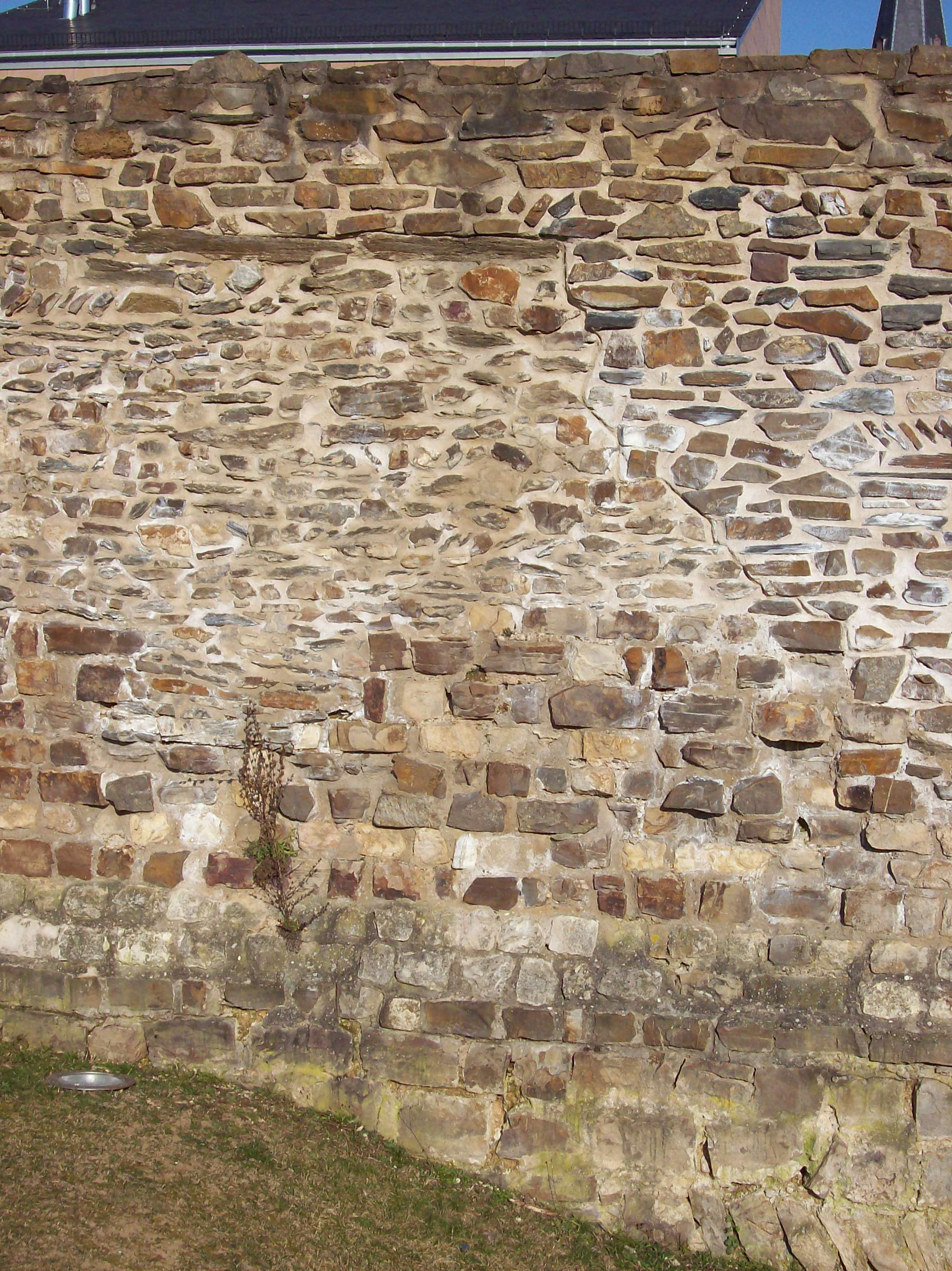 Detailausschnitt der südlichen Mauer des römischen Kastells in Boppard mit zum Teil mittelalterlicher Verblendung (kleine Steine)